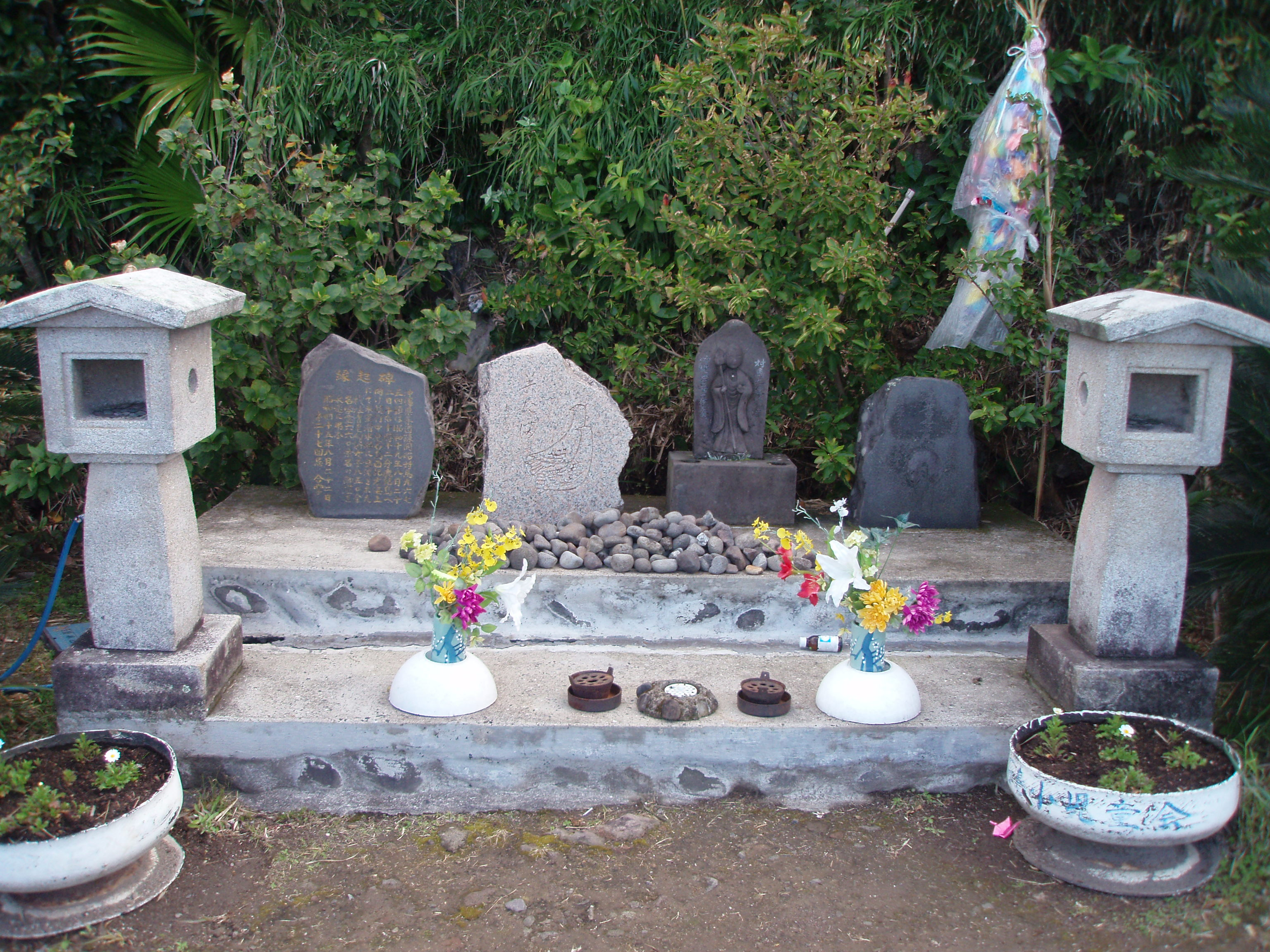 悪石島の対馬丸慰霊碑。